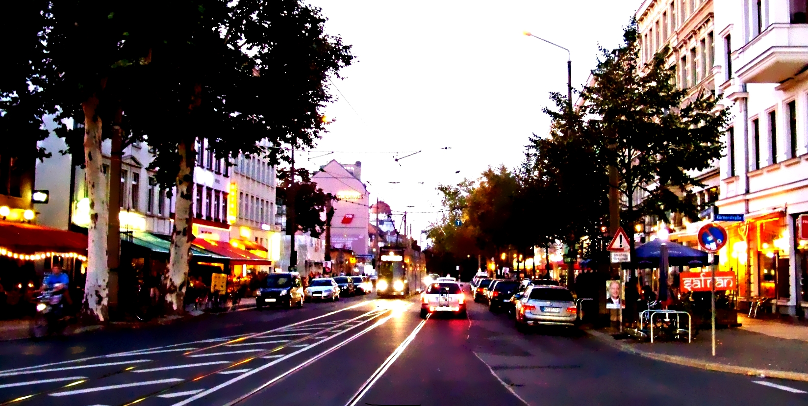 Karl-Liebknecht-Straße in Leipzig, Blick vom Südplatz Richtung Zentrum